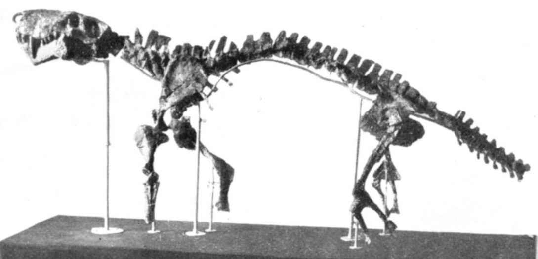 Inostrancevia alexandri holotype skeleton.